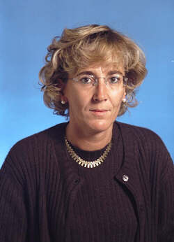 immagine della deputata Giovanna Bianchi Clerici nel 1996